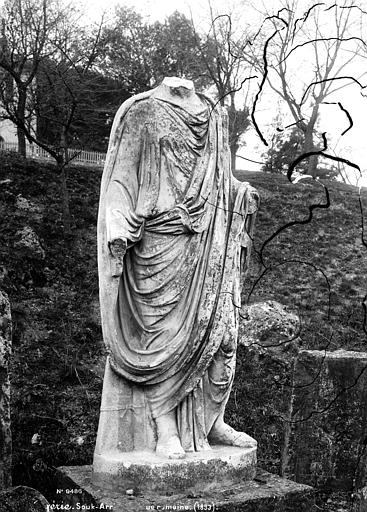 Statue, Souk-Ahras, Algérie